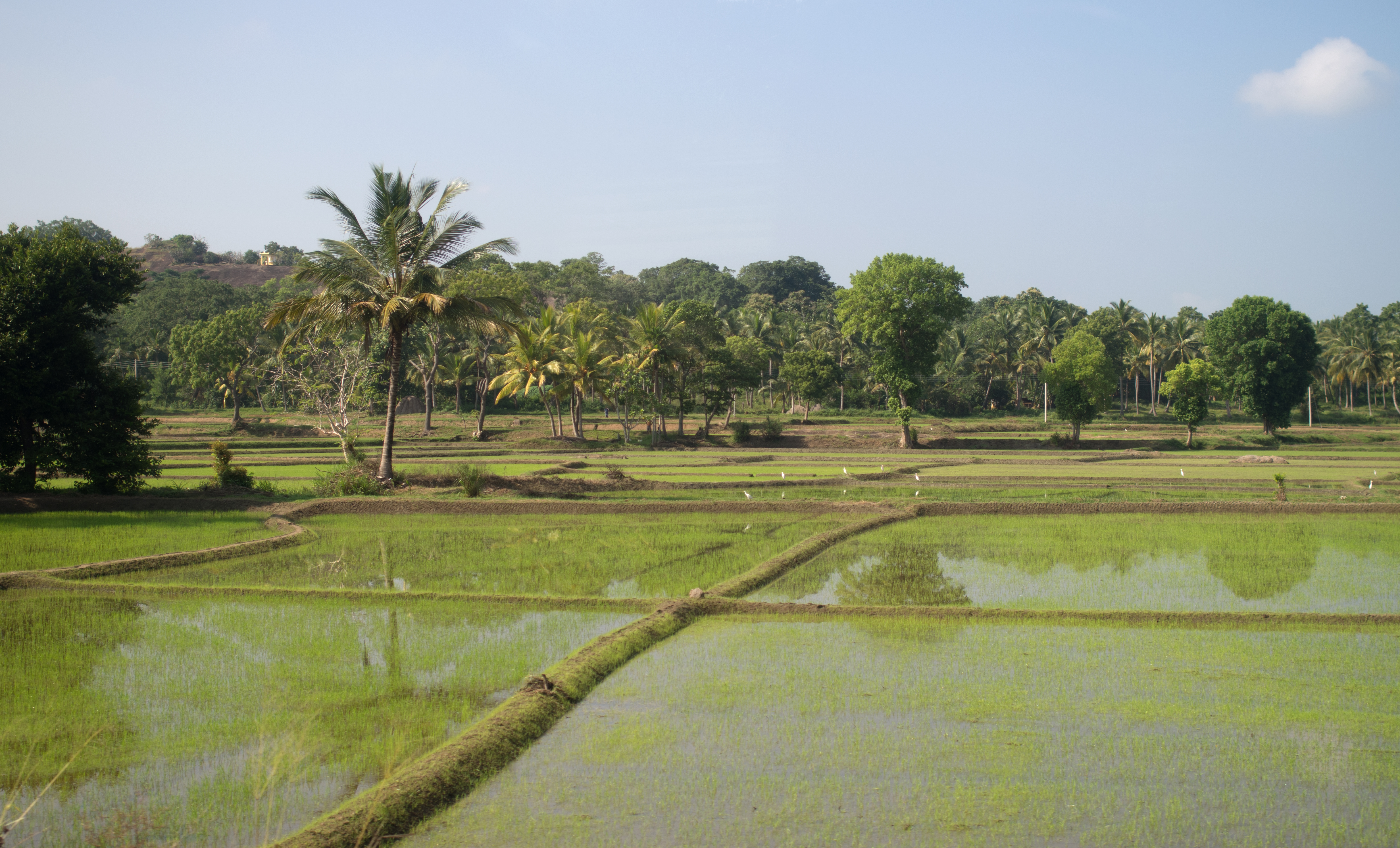 Rizières - Sri Lanka